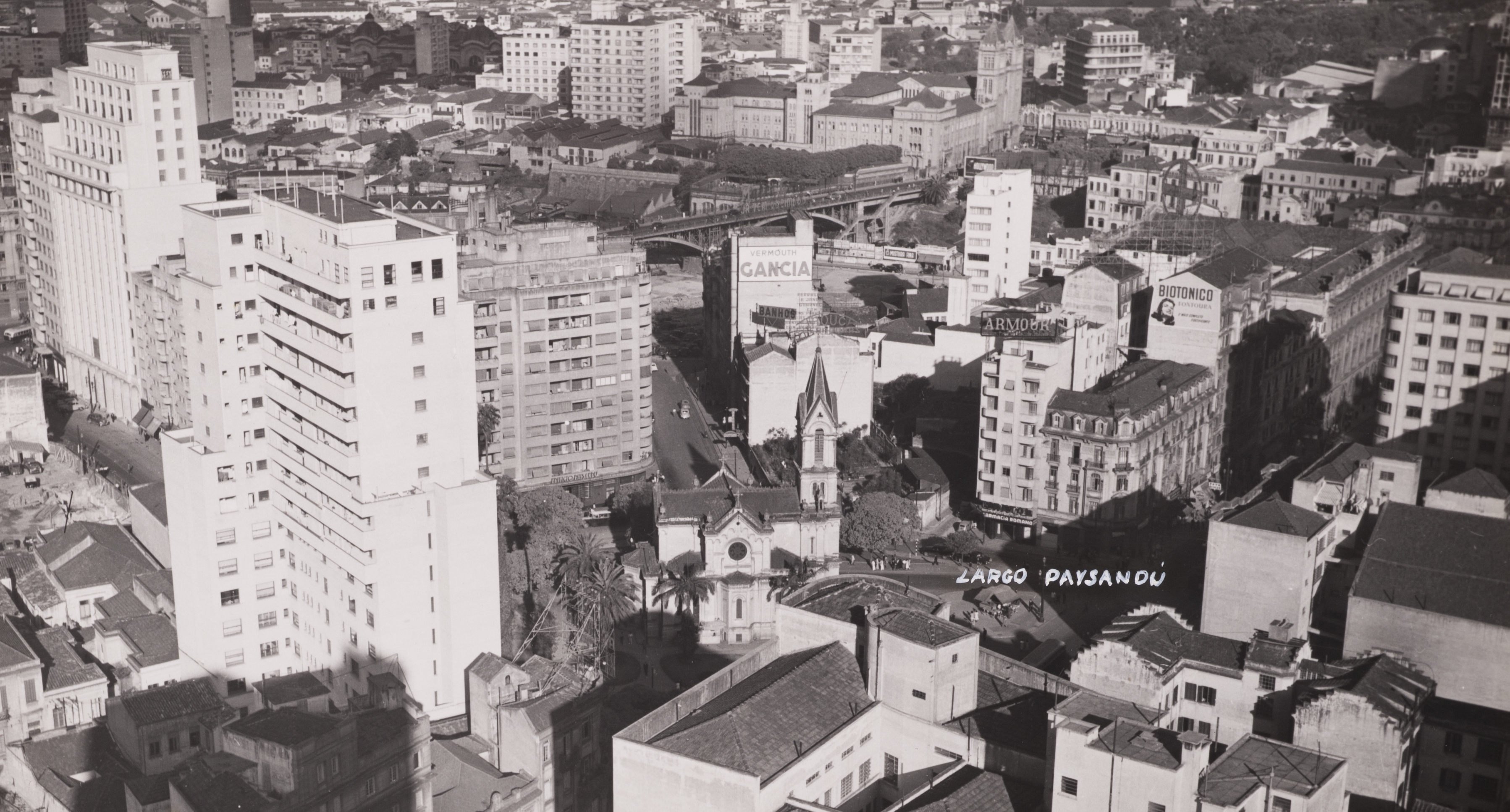 Obra que integra o acervo do Museu Paulista da USP. Coleção Werner Haberkorn - CHW